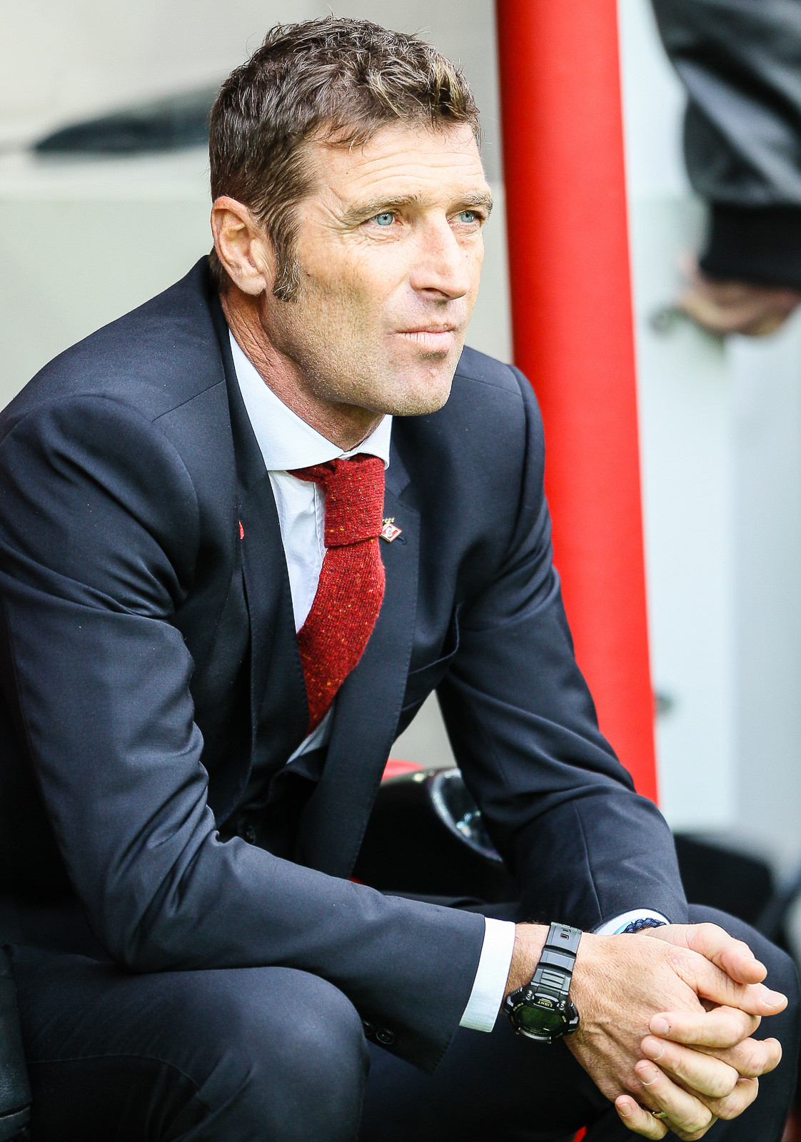 «Спартак» - «Анжи»